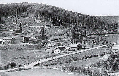 Oil wells in Grabownica Starzeńska, Poland; early 1930's